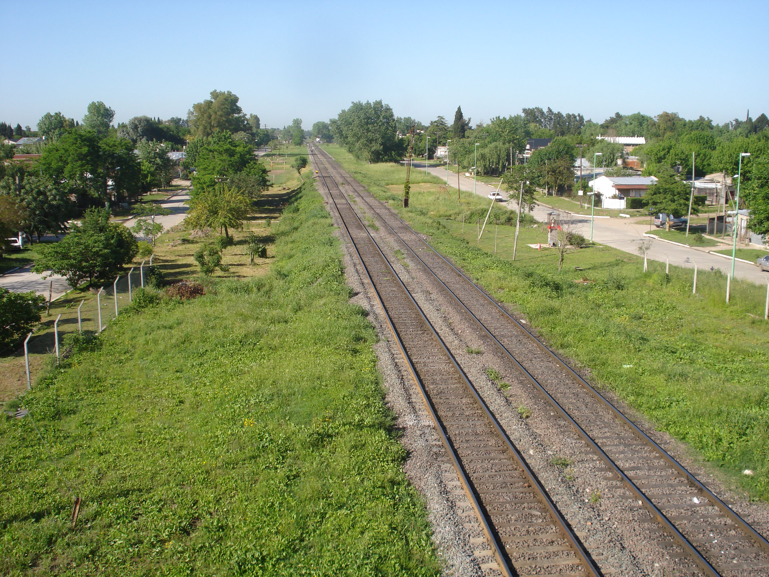 La ciudad de Sourigues, vista desde la Avenida Valentín Vergara, a unas cuadras de la estación.